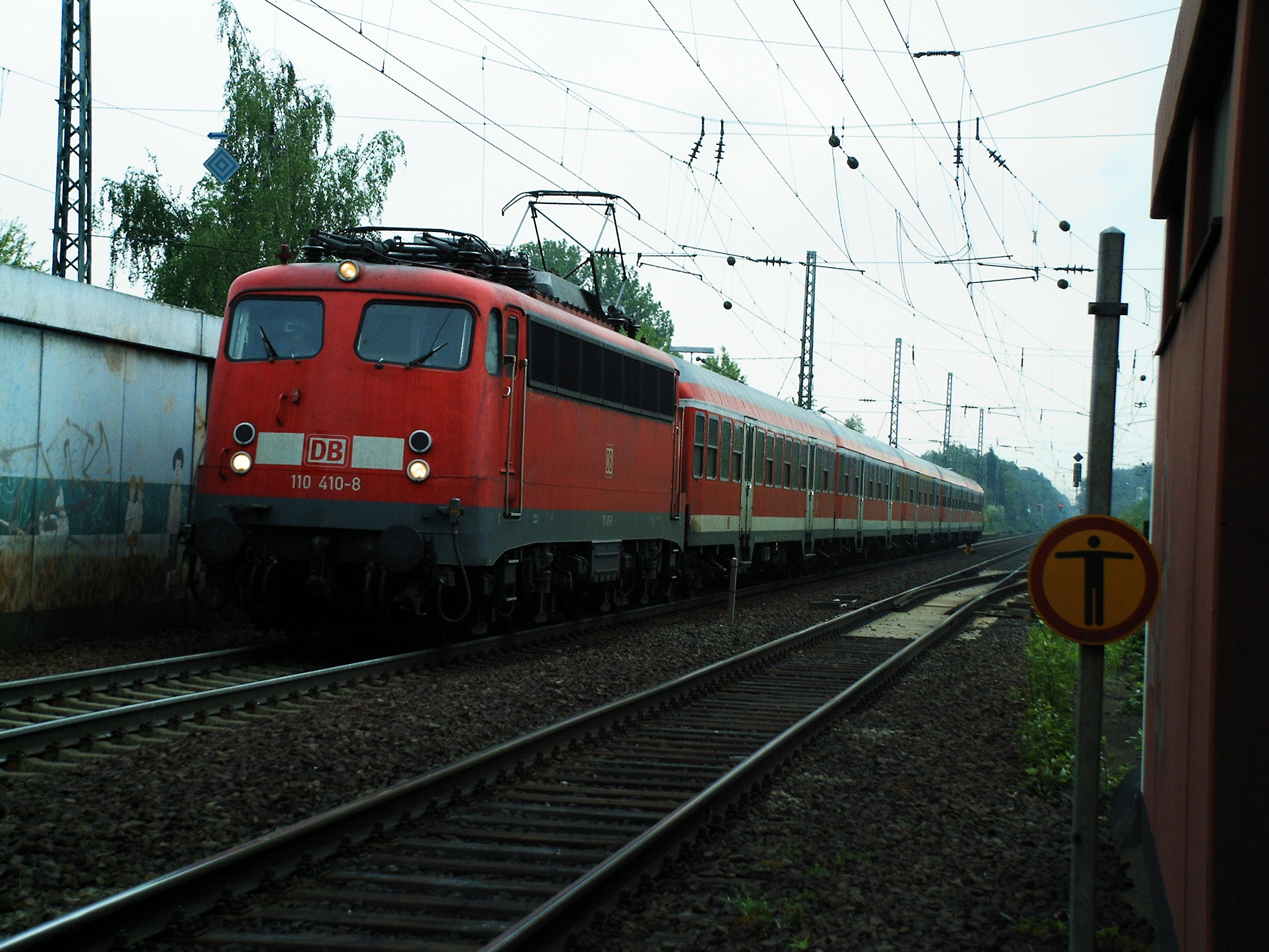 Regionalbahn am Gleis 2 Richtung Frankfurt am Bahnhof Maintal Ost.